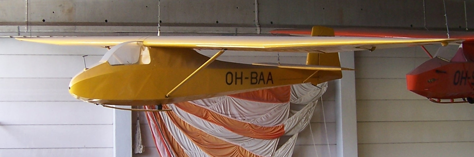 Grunau Baby IIb, gebaut 1943 in Finnland als "OH-Jämi 5", dann OH-BAA, ausgemustert 1970.